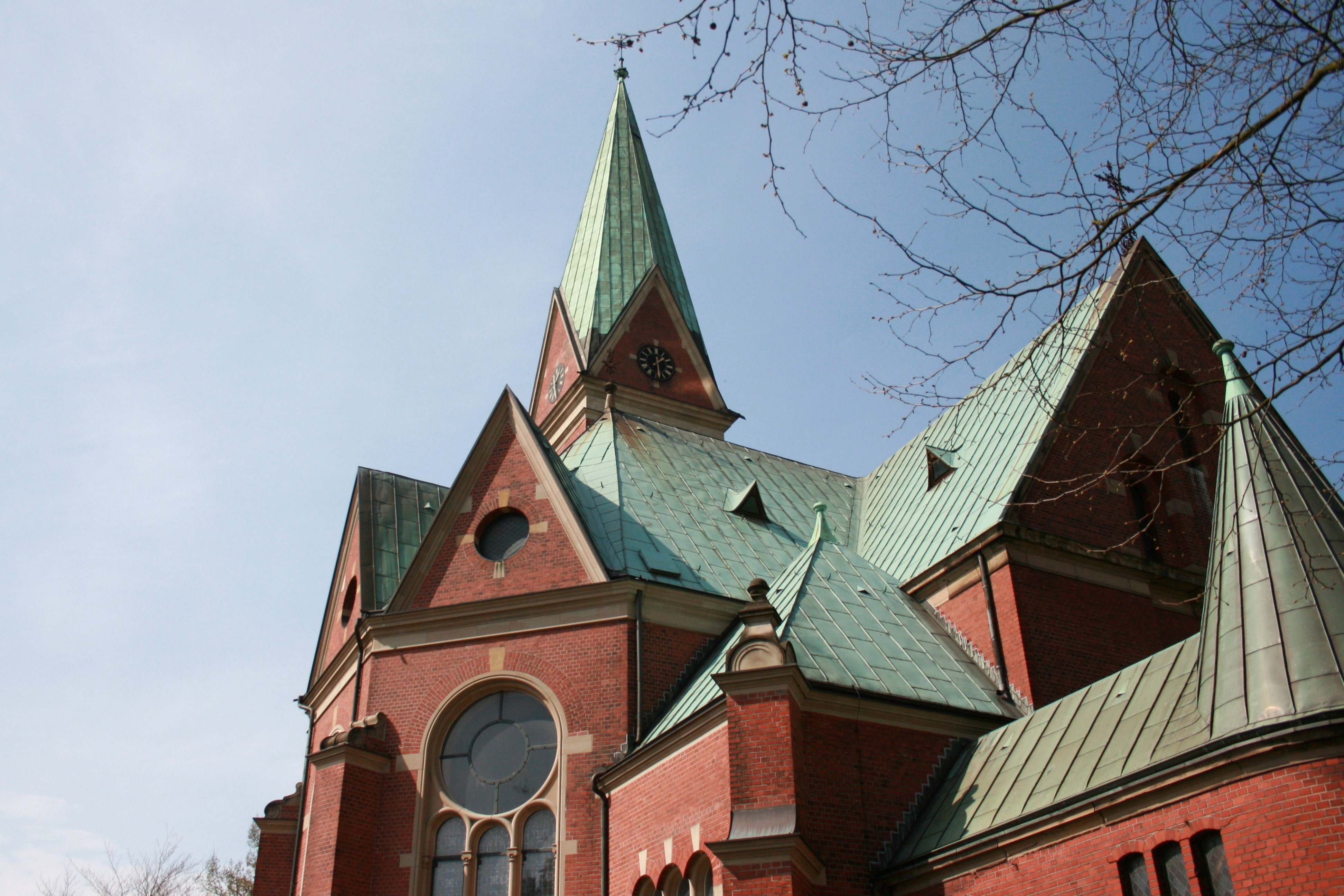 Evangelische Kirche Werden an der Heckstraße in Essen-Werden